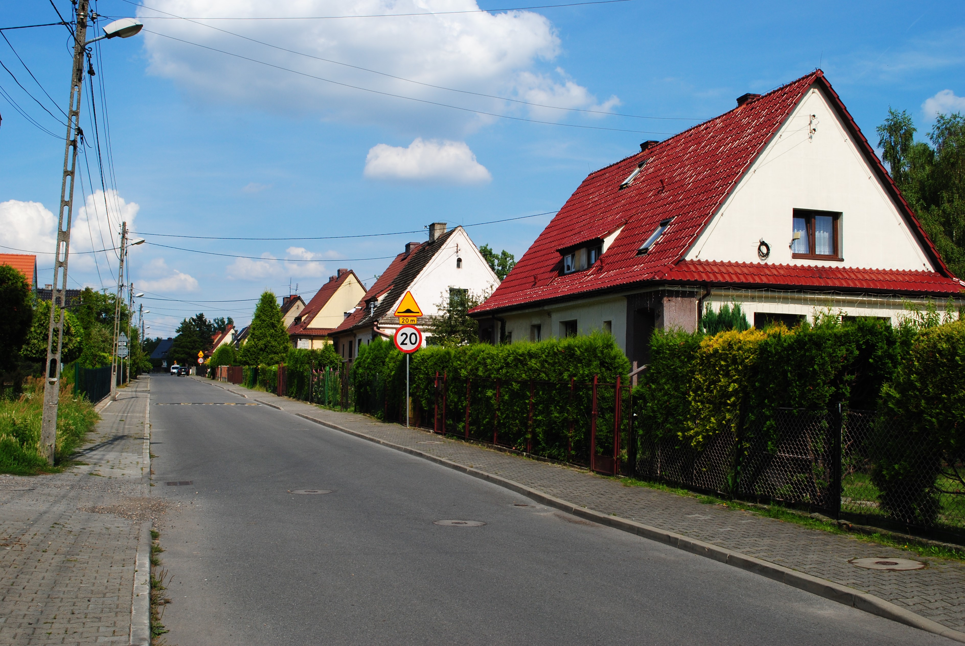 Katowice - Janów-Nikiszowiec. Kolonia Wysockiego